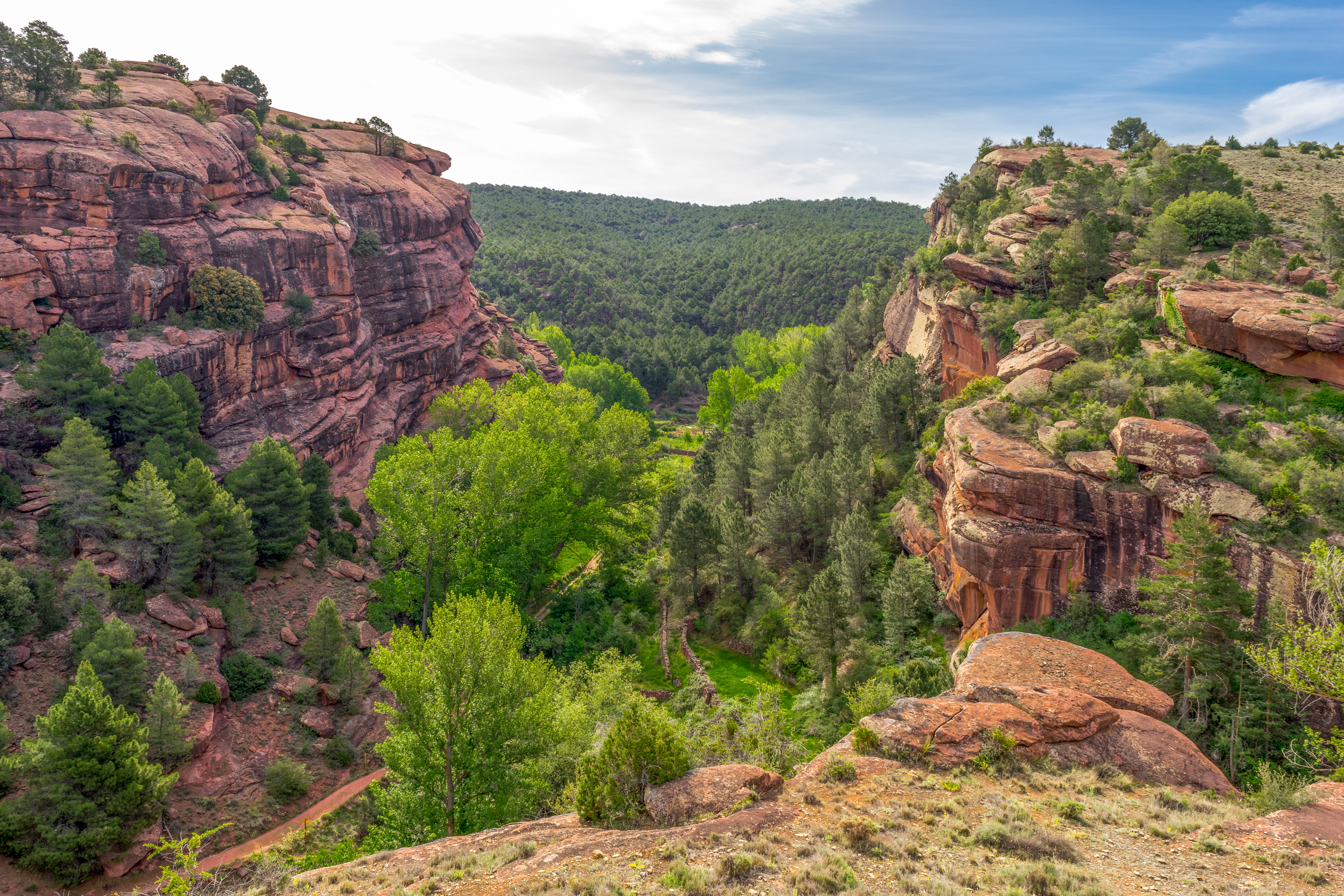 Pinares de rodeno en Albarracín This is a photography of a Site of Community Importance in Spain with the ID: ES2420039. Natura2000 entry, EEA entry